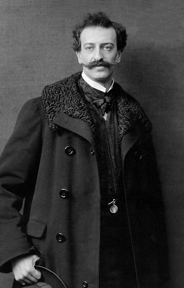 Oscar Straus (composer)